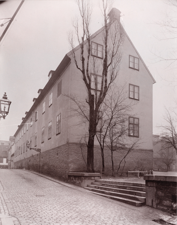 Klara gamla skola. Fasaden mot gatan